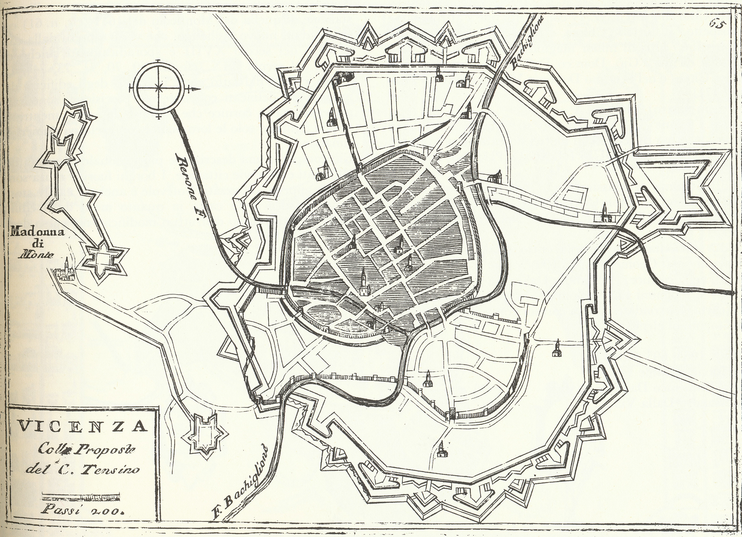 Vicenza - Pianta di Vicenza con proposte del Tensini, 1708